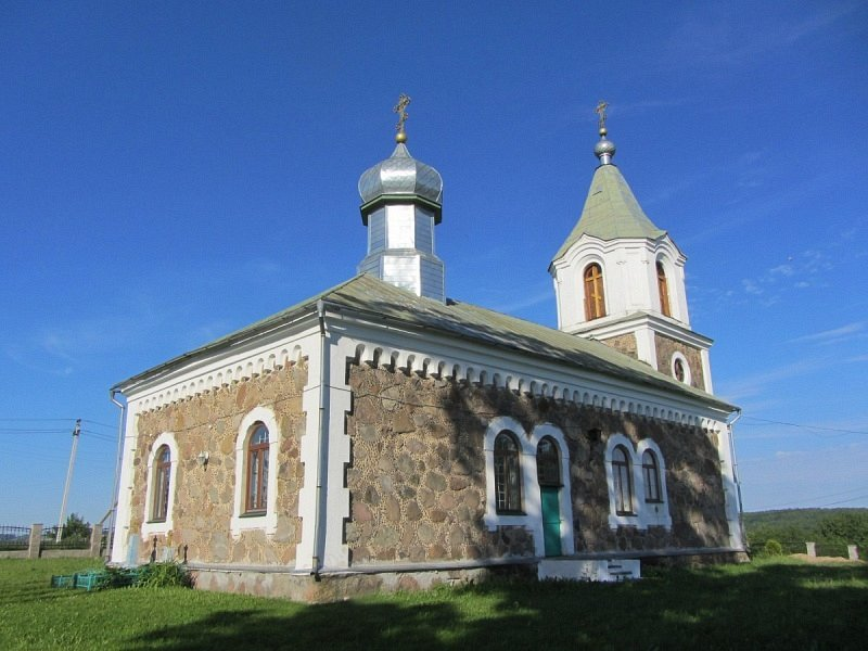 Маркава. Царква